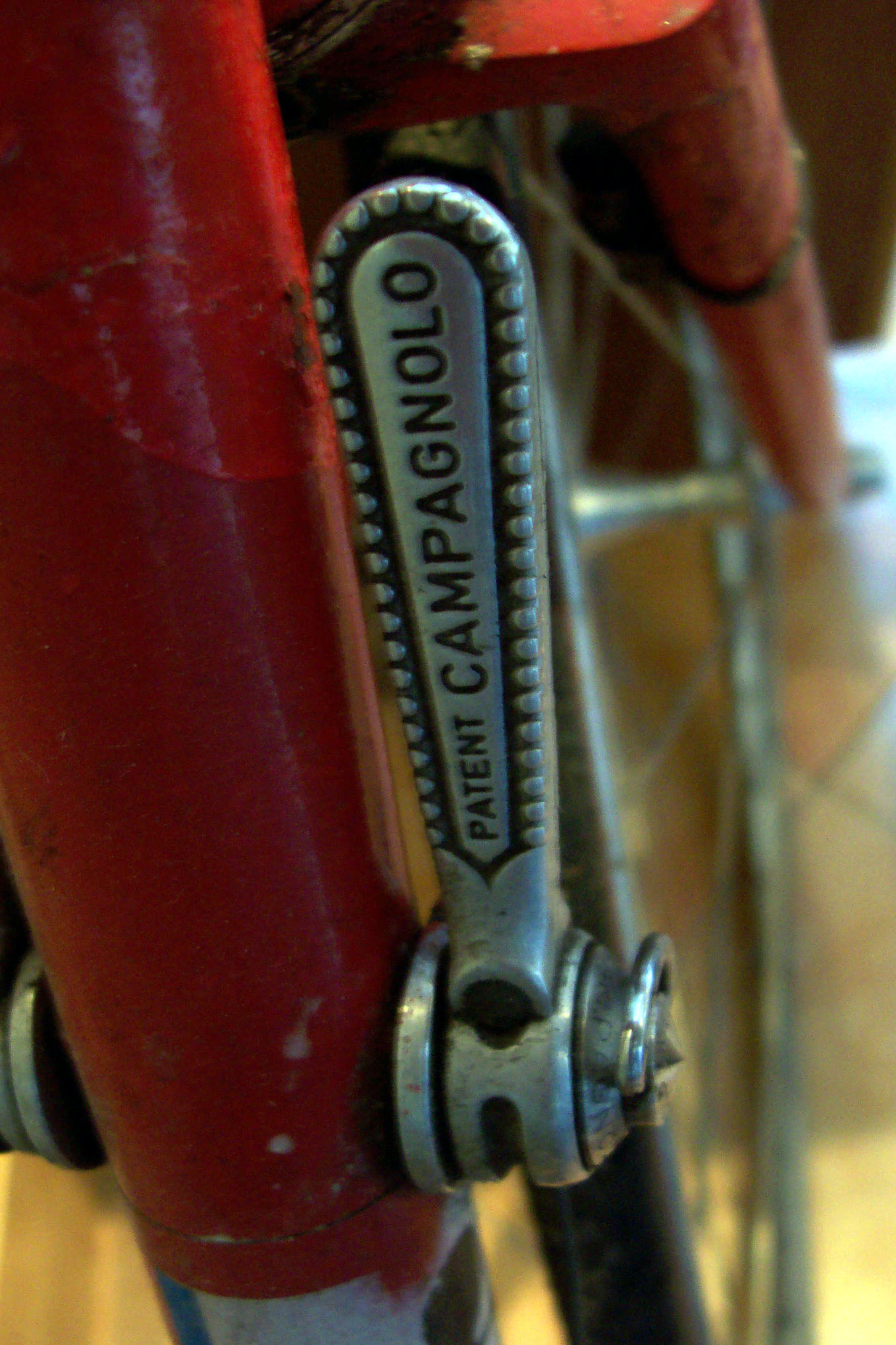 Manetka rowerowoa Campagnolo